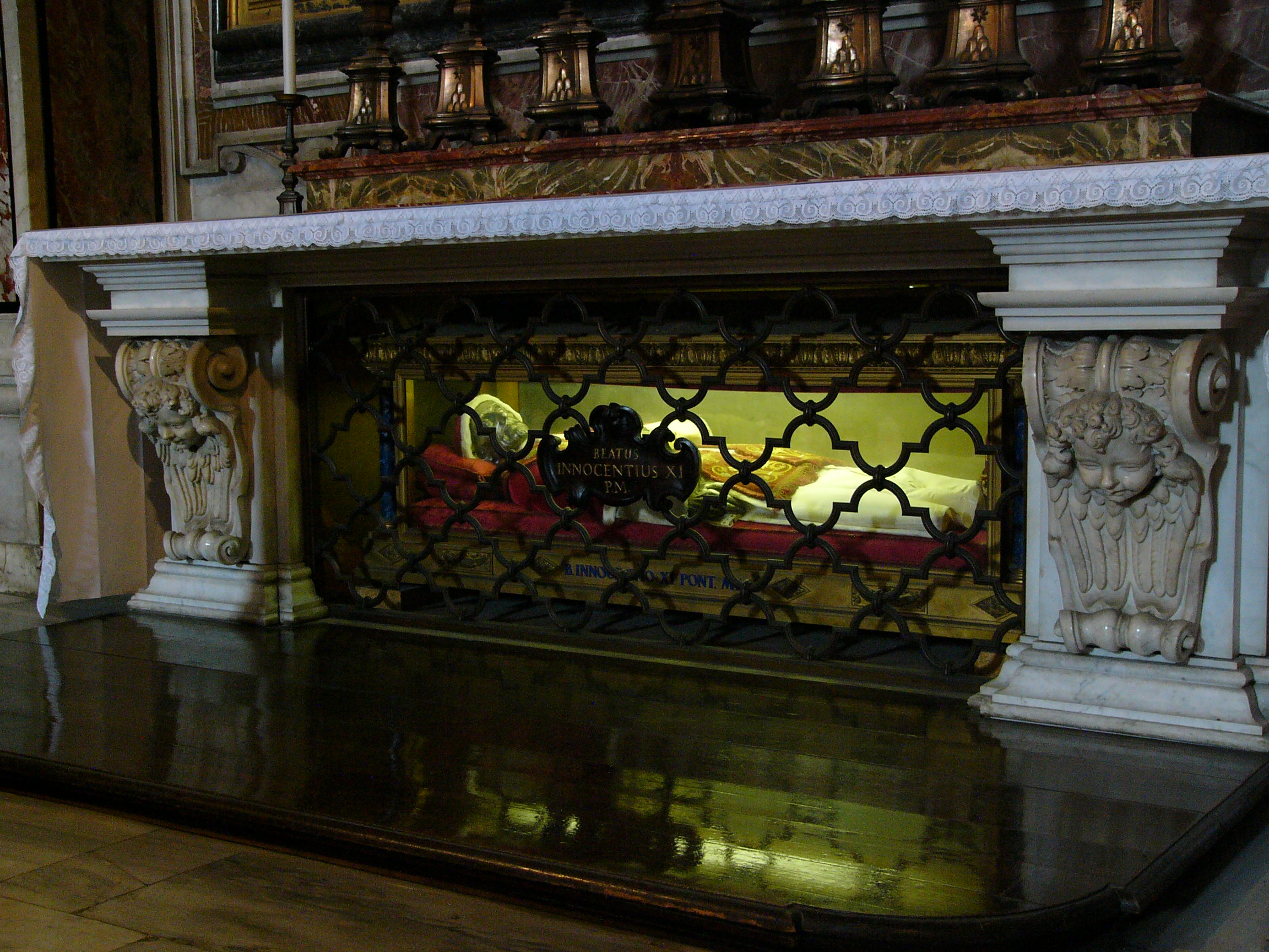 Das Foto zeigt den im Petersdom in Rom in einem gläsernen Sarg verehrten Papst Innozenz XI. Hierher wurde der Leichnam im Zuge seiner Heiligsprechung überführt.